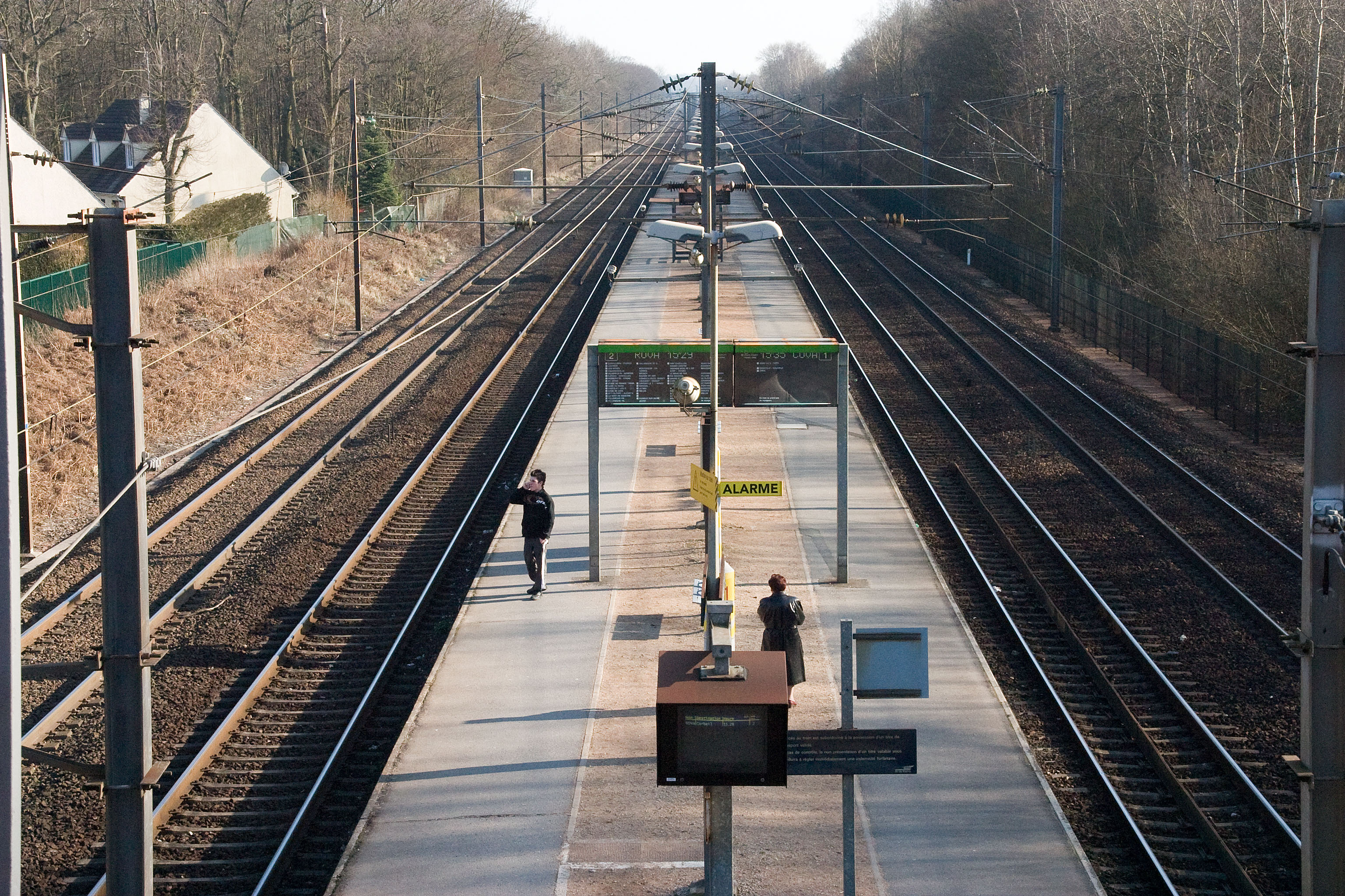 Gare de La Borne Blanche - Orry-la-Ville, département de l'Oise (France)